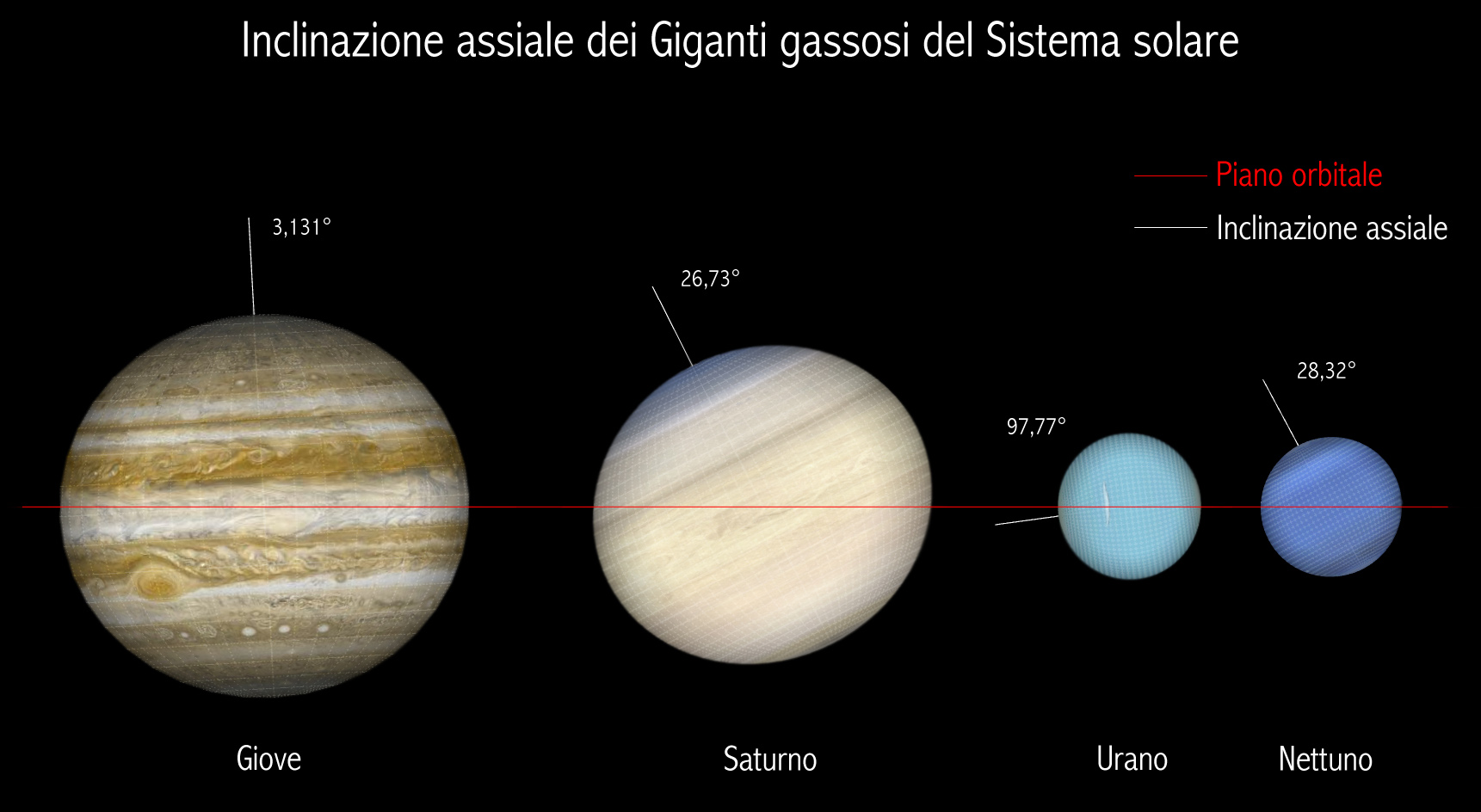 Confronto tra le inclinazioni assiali dei Giganti gassosi. Le dimensioni sono in scala. Le distanze non sono in scala.